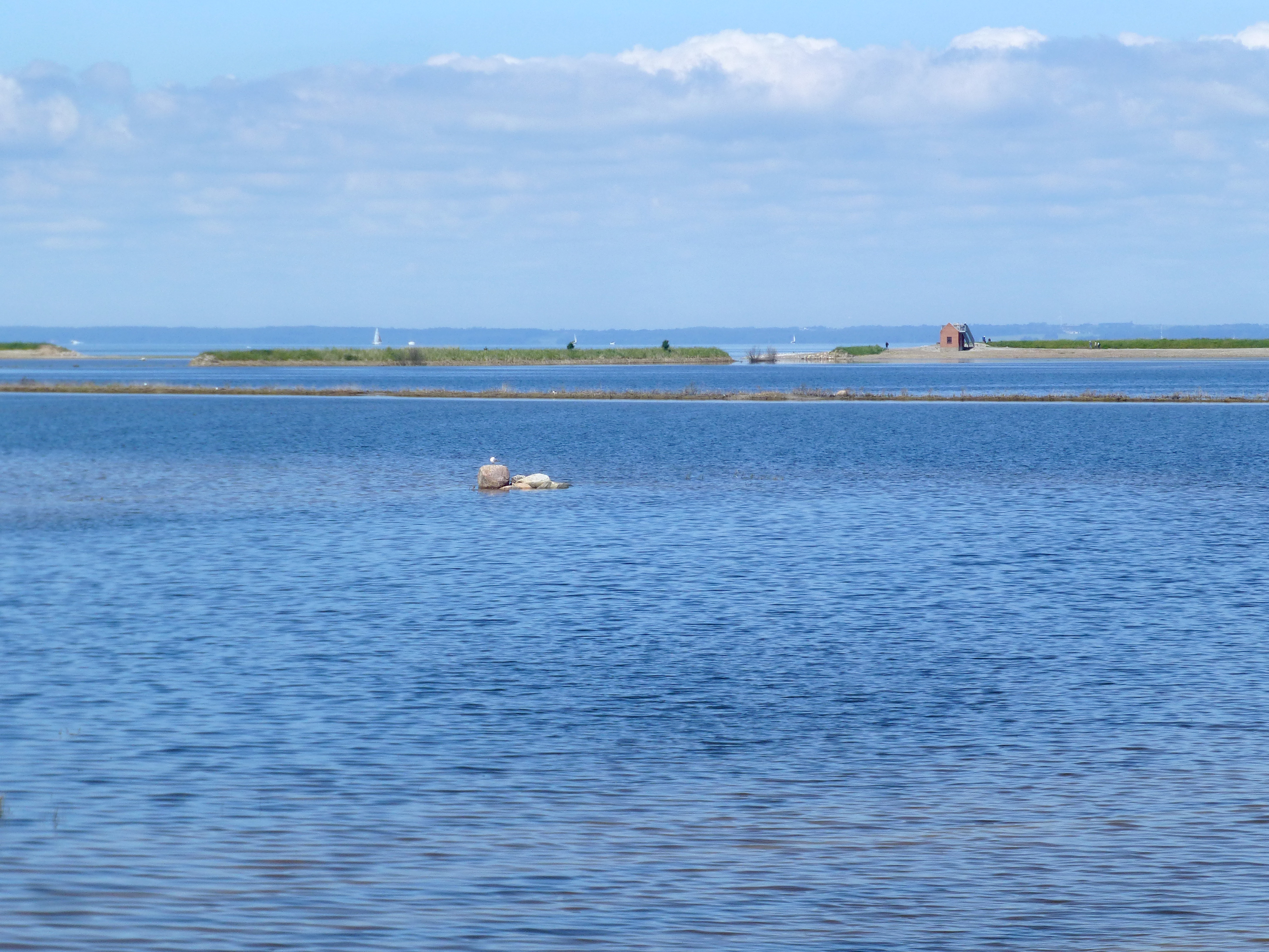 Den gendannede kystlagune ved Gyldensteen Strand